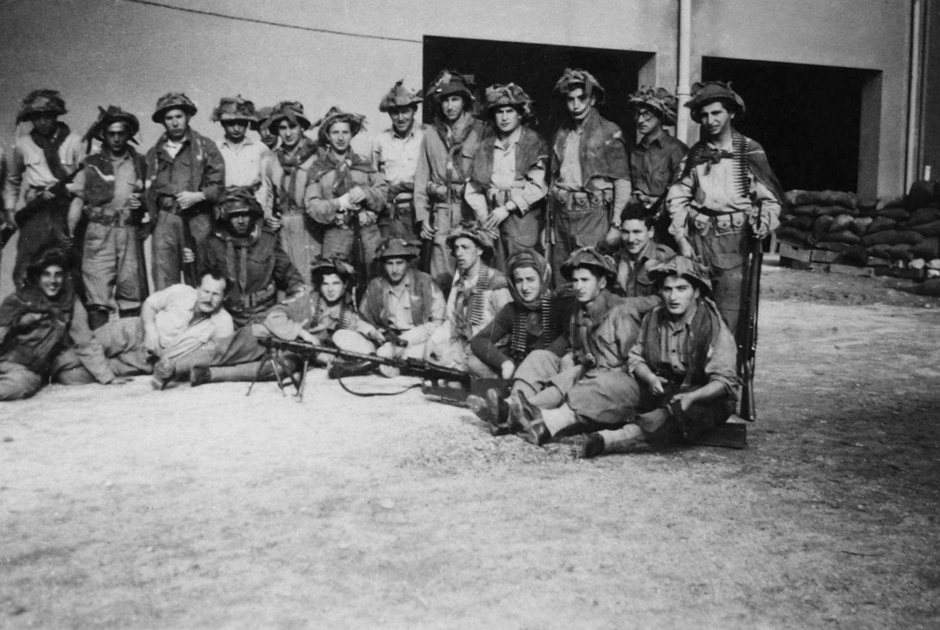 המחלקה של אבא מגדוד ברק בגולני, השתתפה בקרבות של עמק הירדן במלחמת השחרור, בזמןהפוגה ראשונה מתאמנת ושומרת על משטרת גשר